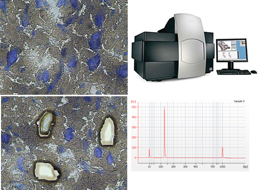 Agyszövet metszet, LCM, génexpesszió